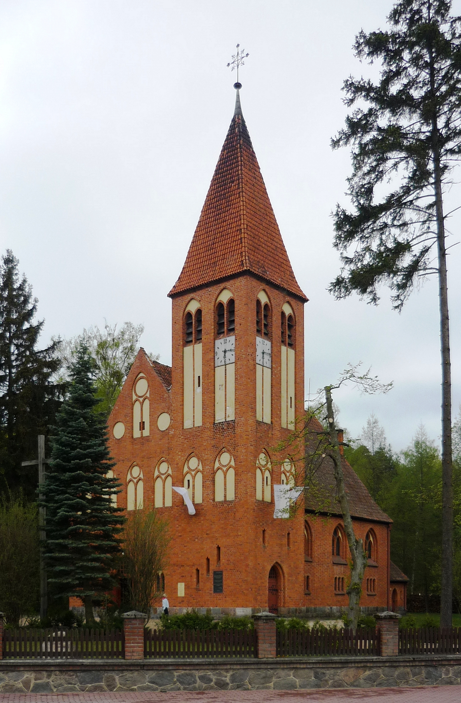 Spychowo, ul. Mazurska 9 - dawny kościół ewangelicki, obecnie rzymskokatolicki parafialny p.w. Matki Boskiej Nieustającej Pomocy, 1903-1906